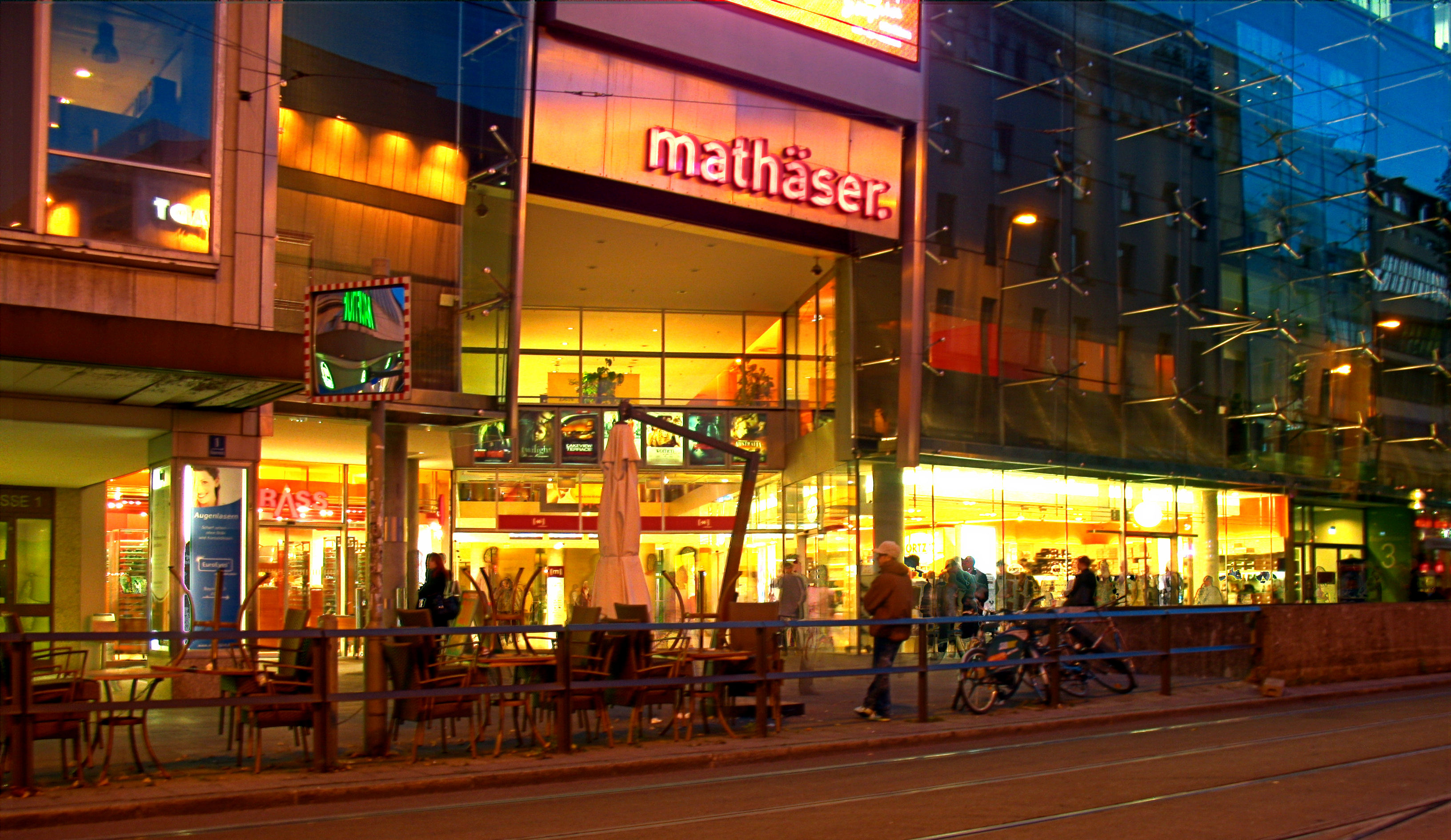 Germany, Bavaria, Munich, Mathäser-Einkaufspassage in der Bayerstraße